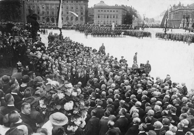 Die Verfassungsfeier in Berlin fand unter Beisein des Reichspräsidenten im Lustgarten am 11. August statt. Der Reichspräsident nahm dort die Parade von 7.000 Berliner Schutzpolizisten ab. Der Reichspräsident Ebert (x) hält eine Ansprache an die Schutzpolizisten.